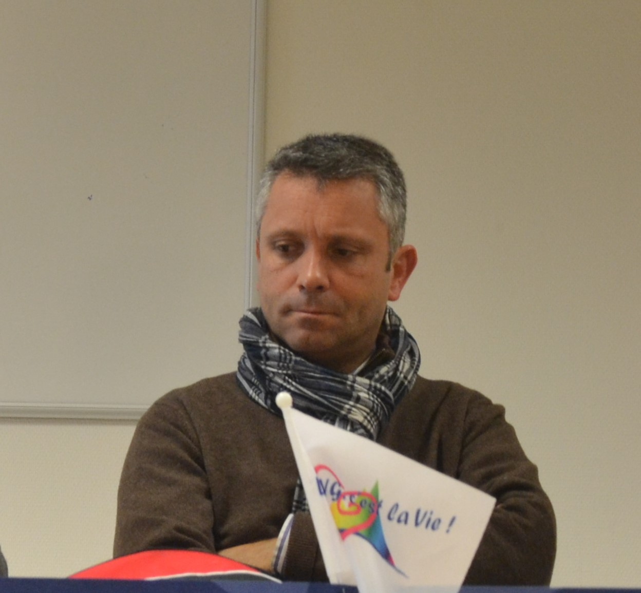 Hervé de Lepineau, conseiller départemental de Vaucluse, canton de Carpentras